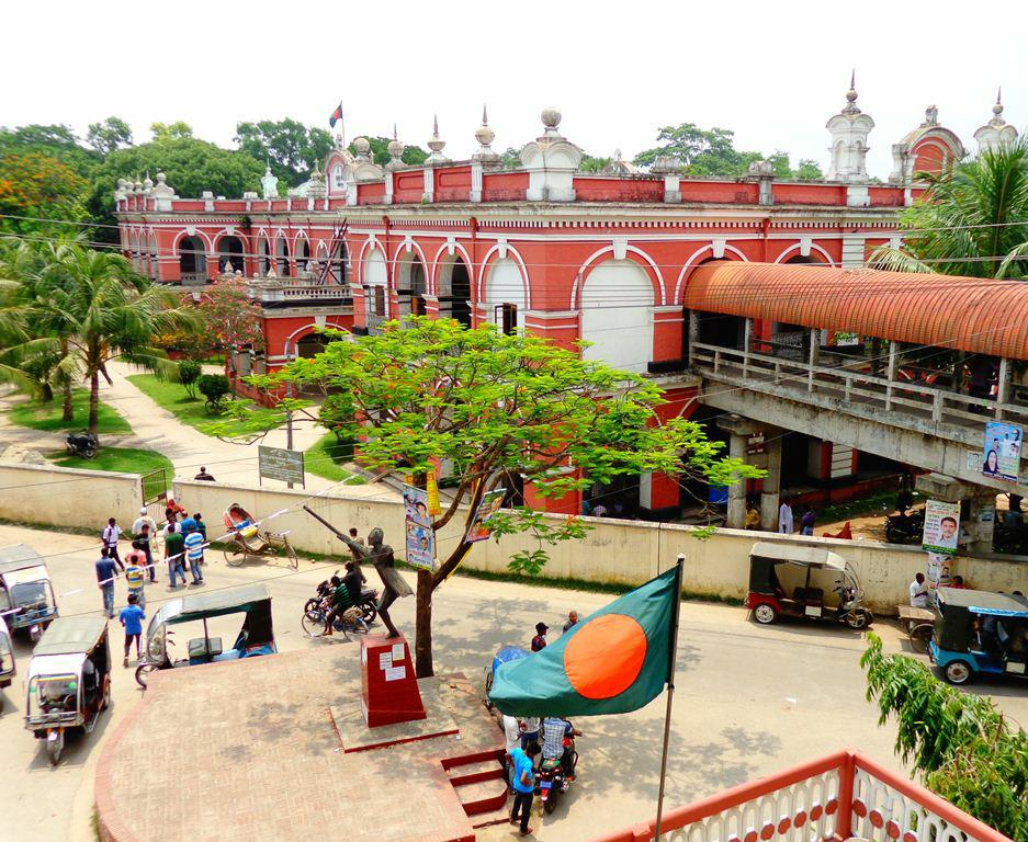 এটা একটা ব্রিটিশ স্থাপত্য।